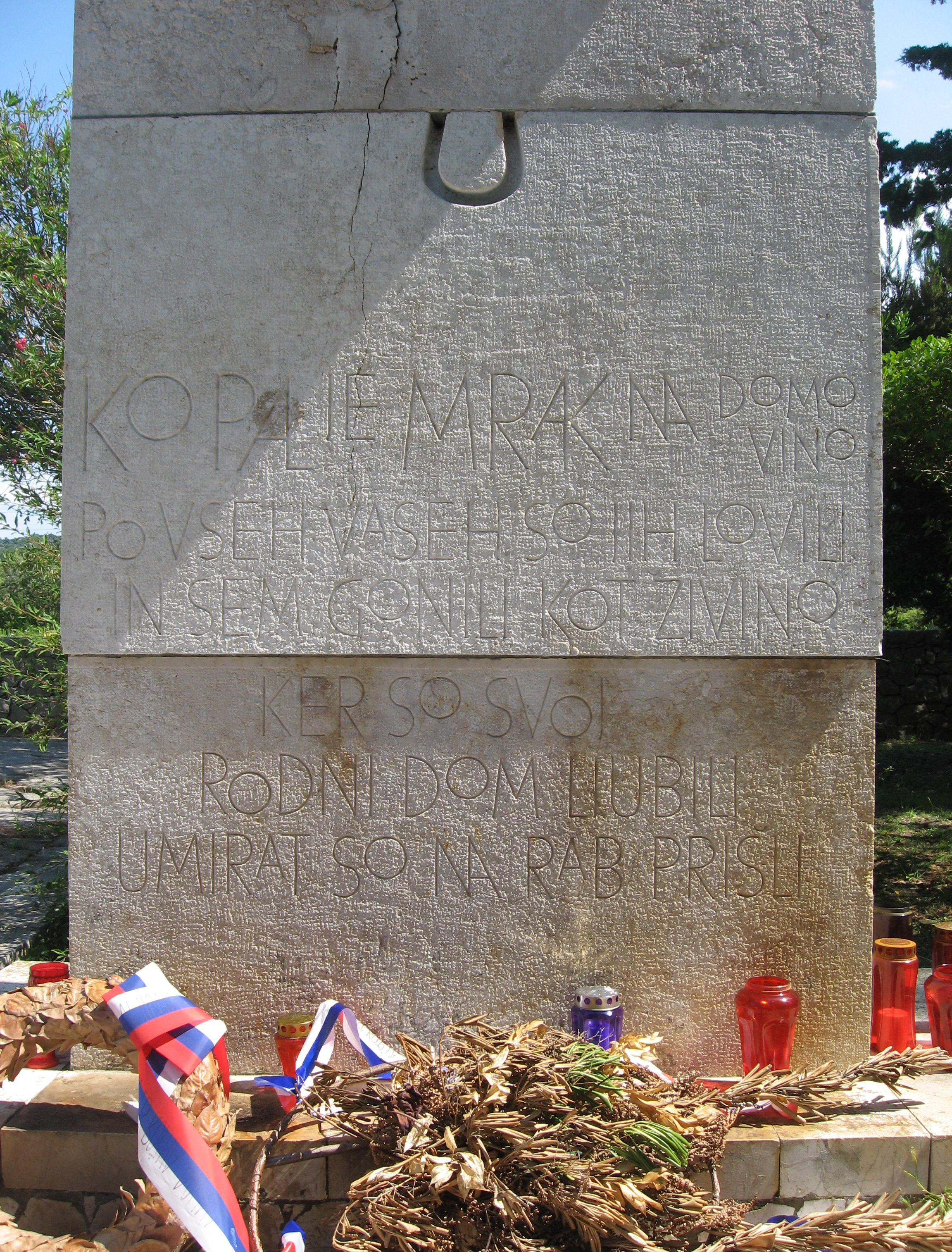 Dedica commemorativa scolpita sulla lapide posta nel cimitero monumentale sull'isola di Arbe in memoria delle vittime del campo di internamento italiano, durante la seconda guerra mondiale